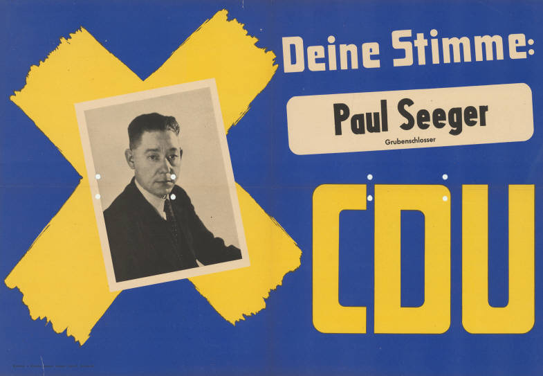 Deine Stimme: Paul Seeger Grubenschlosser CDU Abbildung: Porträtfoto - Stimmkreuz Plakatart: Kandidaten-/Personenplakat mit Porträt Drucker_Druckart_Druckort: Bilddruck u. Klischee Lambert Lensing G.m.b.H., Dortmund Objekt-Signatur: 10-009 : 218 Bestand: Landtagswahlplakate Nordrhein-Westfalen (10-009) GliederungBestand10-18: Landtagswahlplakate Nordrhein-Westfalen (10-009) » Landtagswahl am 18.6.1950 » CDU » mit Porträtfoto Lizenz: KAS/ACDP 10-009 : 218 CC-BY-SA 3.0 DE